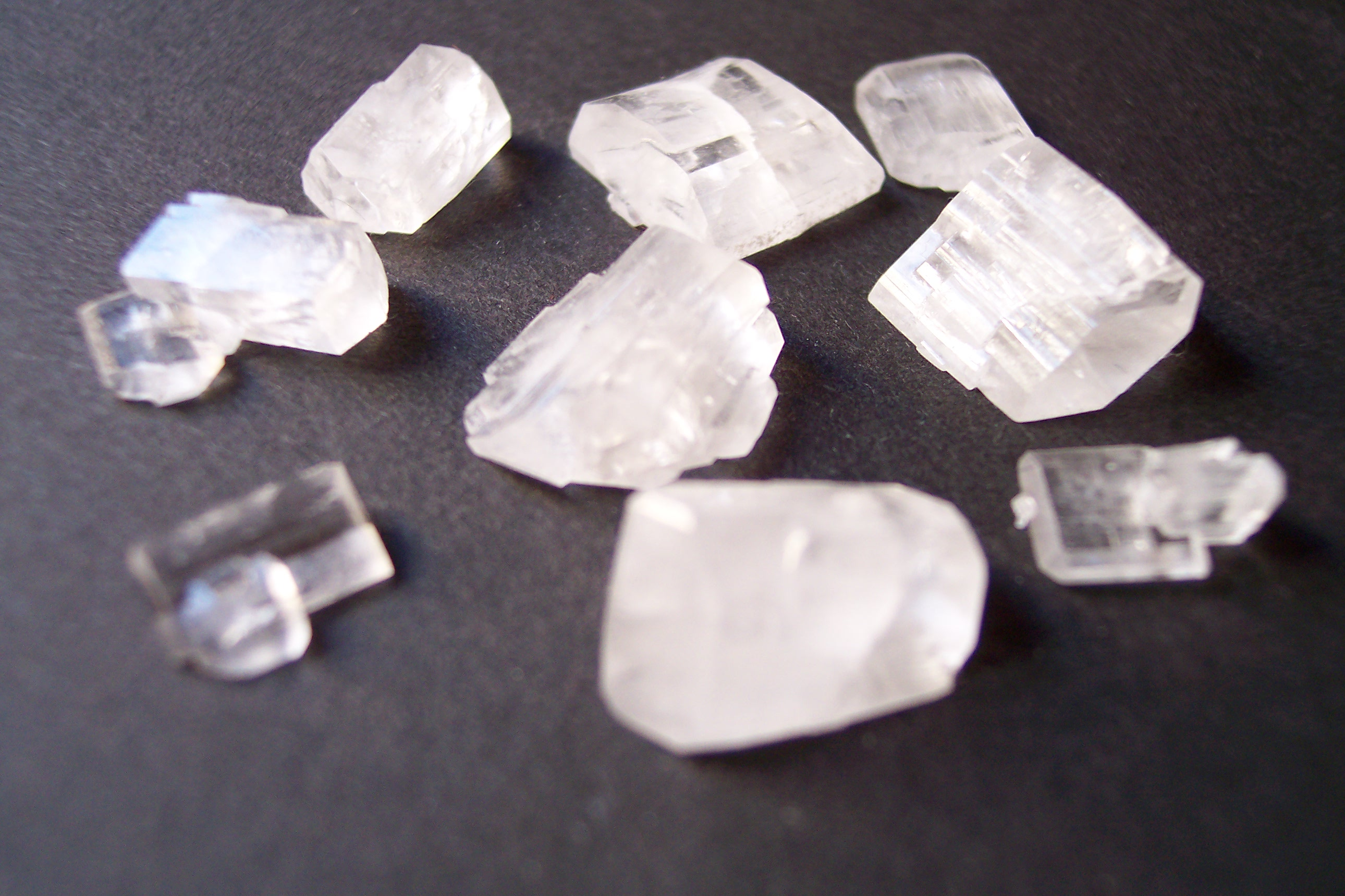 Beschreibung: Natriumcitrat-Kristalle Quelle: Bild selbt erstellt Datum: 28. Oktober 2006 Autor: Toffel